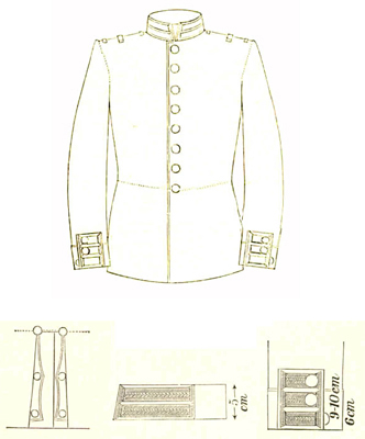 Vapenrock m/1886 typ II, ritning.